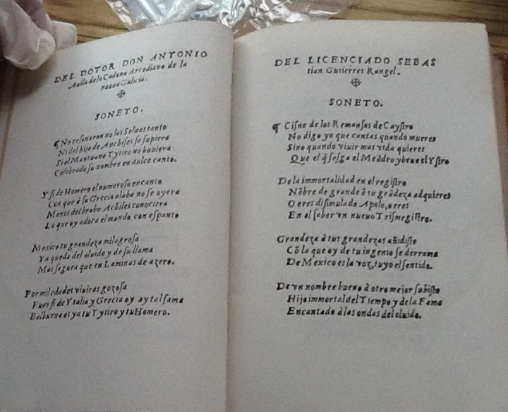 Soneto presente en la edición de 1604 de Ocharte